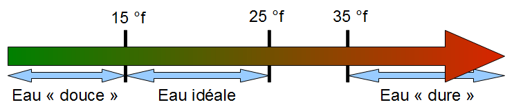 échelle de dureté de l'eau (sont placées sur ce schéma les eaux douces, dures et idéales)